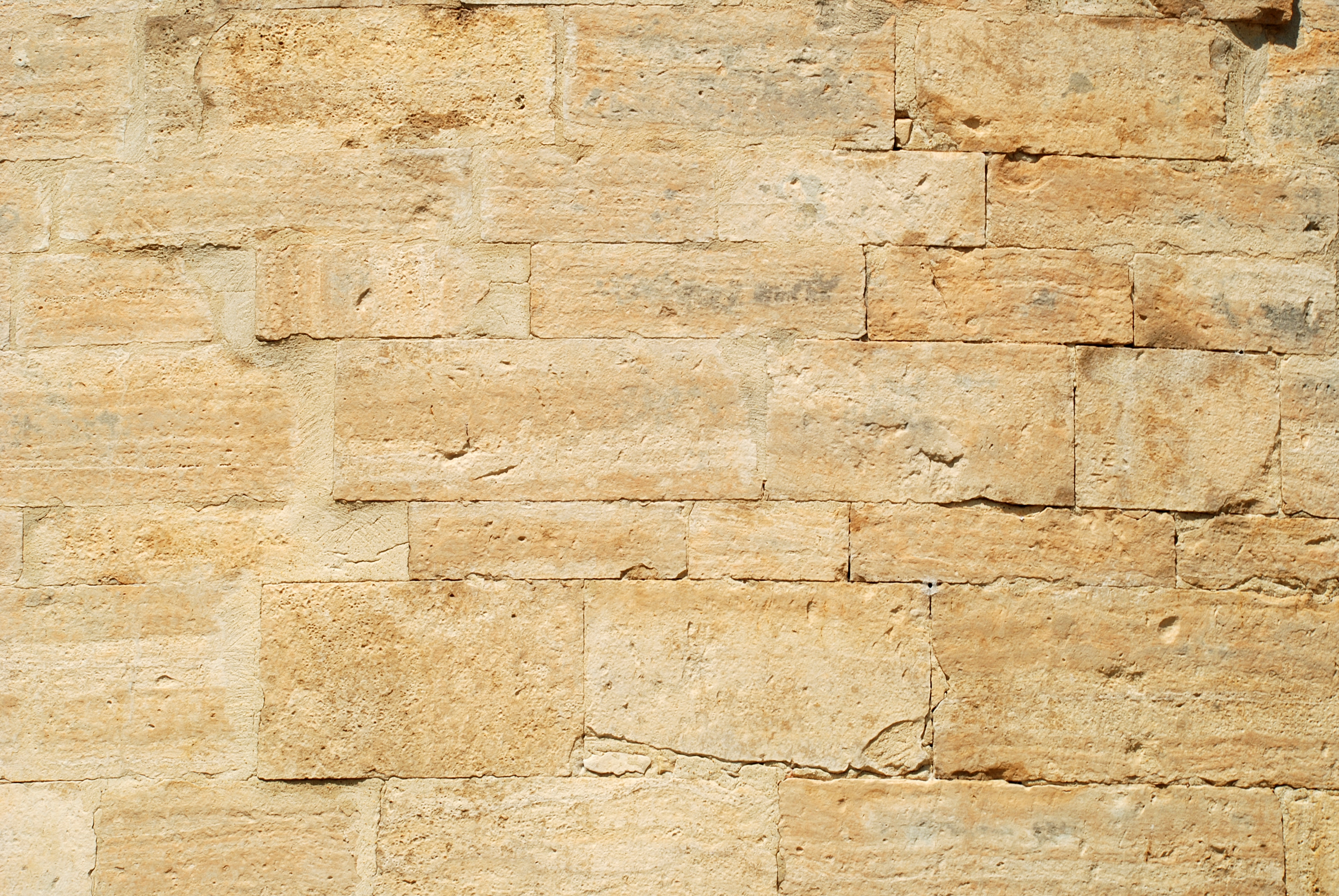 France - Languedoc - Guzargues - Opus monspelliensis